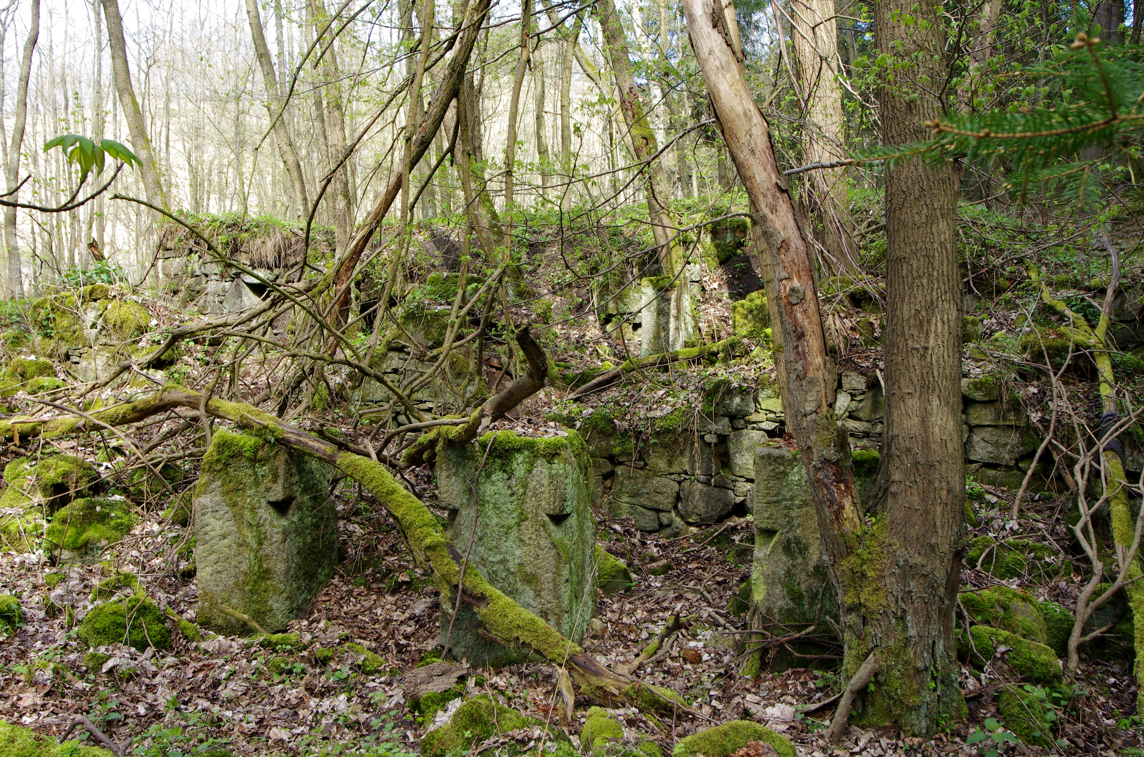 Lobezský potok, pozůstazky Železného mlýna v bývalé obci Vítkov, okres Sokolov